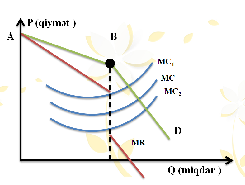 Sınıq tələb əyrisi